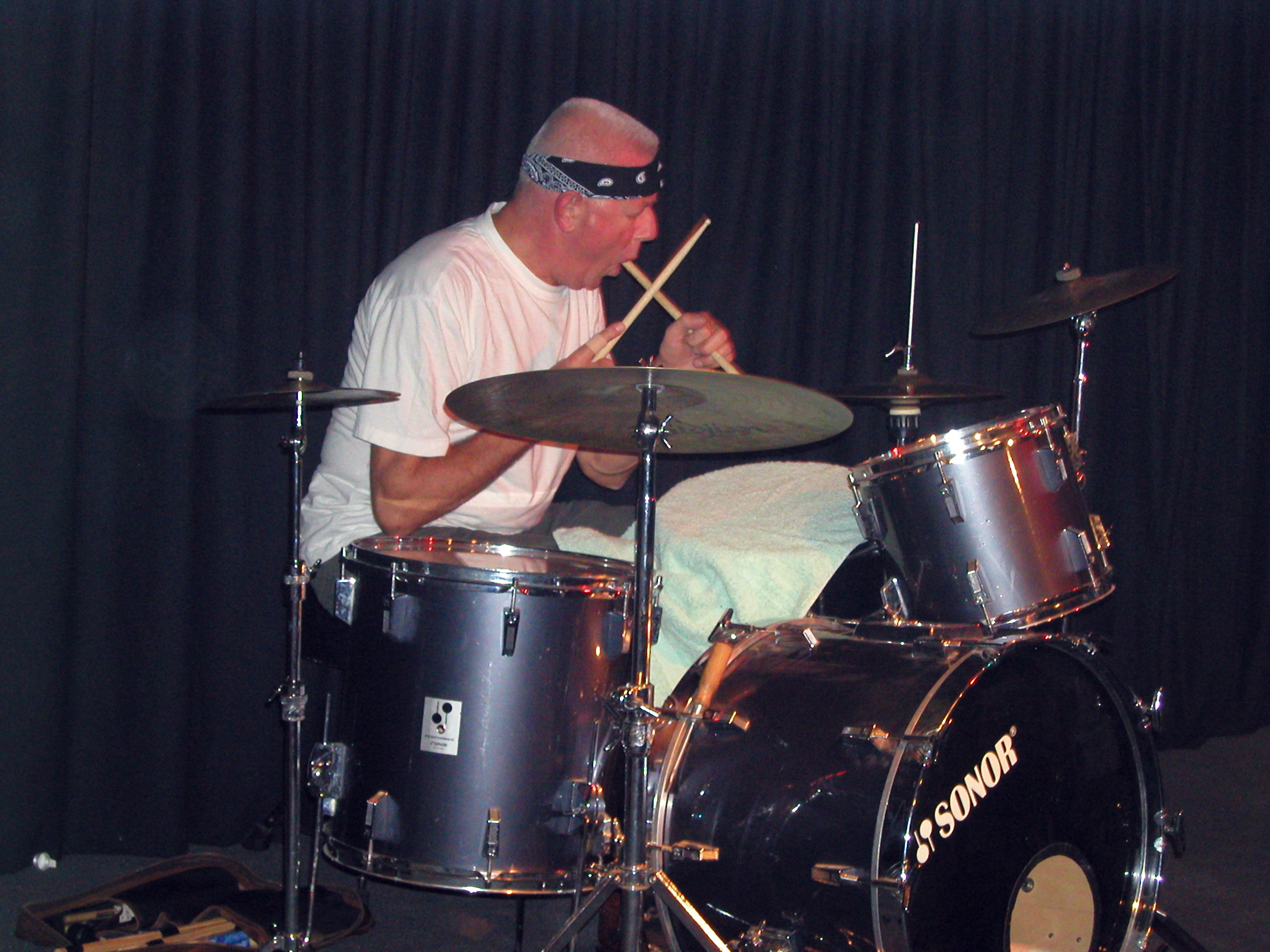 Han Bennink im Club W71 in Weikersheim